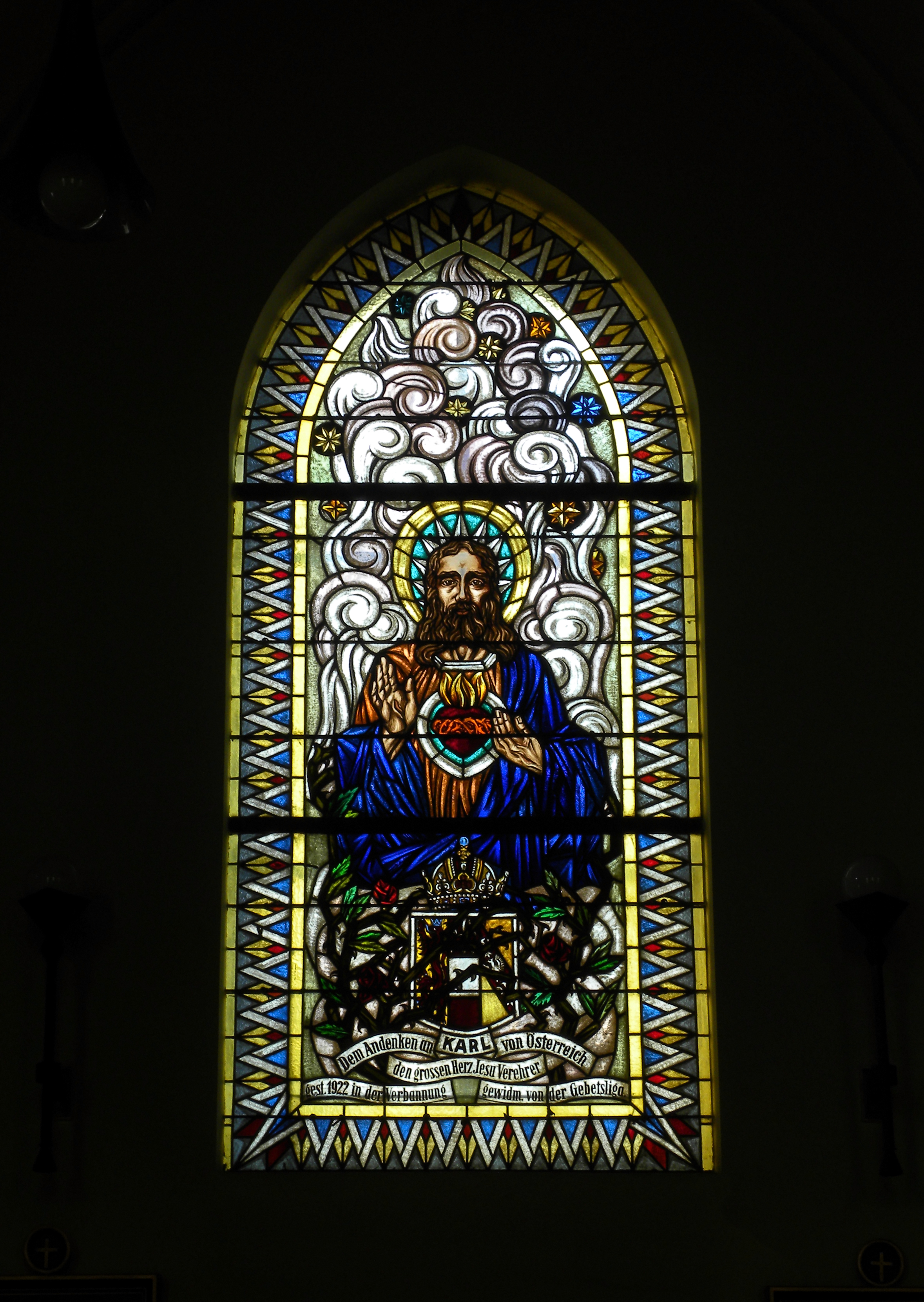 Fenster in der Starchant-Kirche (Wallfahrtskirche zur Heiligen Theresia vom Kinde Jesu). Entwurf von Prof. Reinhold Klaus, Wien, ausgeführt von der Firma Geyling in Wien.